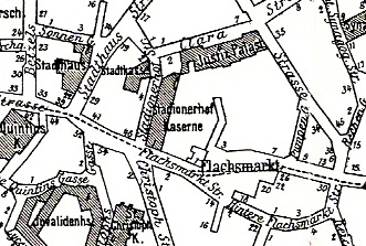 Gebiet rund um den Flachsmarkt in Mainz 1894